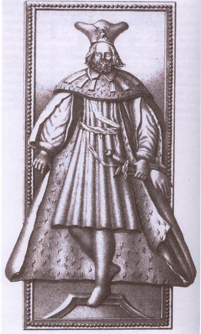 Deitsch: Stukko-Flachrelief Leutolds von Wildon, um 1690. Die Pfarrkirche Hl. Katharina (Stainz).